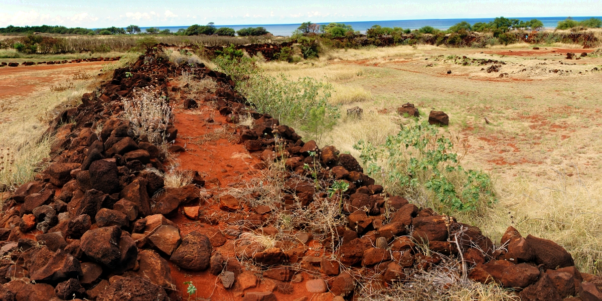 Иллюстрация для викиучебника Гавайеведение